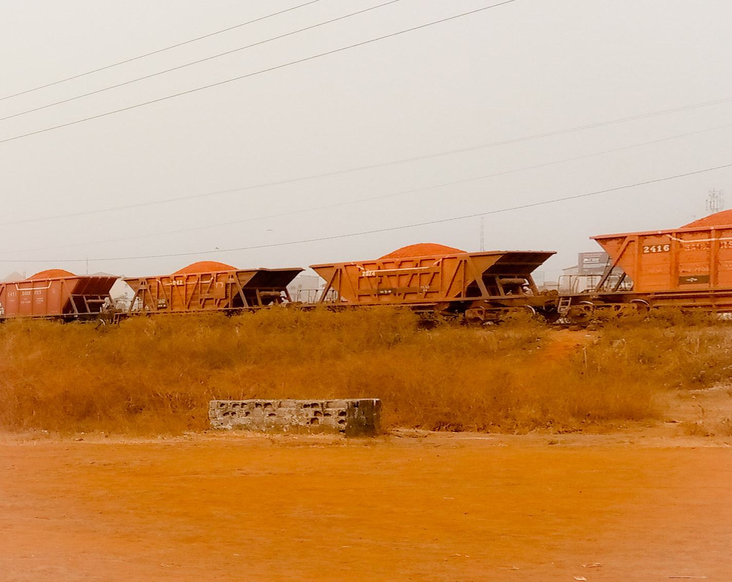 Quelques wagons du train de la CBK quitte Debelin(Kindia ) pour le chargement et en chemin vers le port. This is an image with the theme "Africa on the Move or Transport" from: Guinea